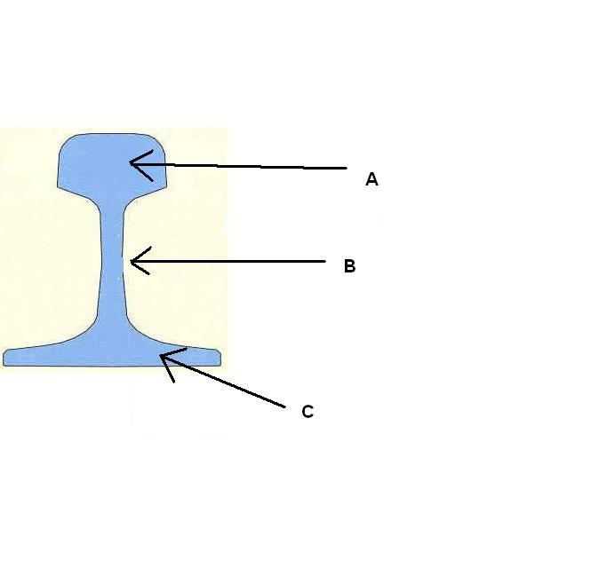 Obrázek kolejnice pro upřesnění názvů